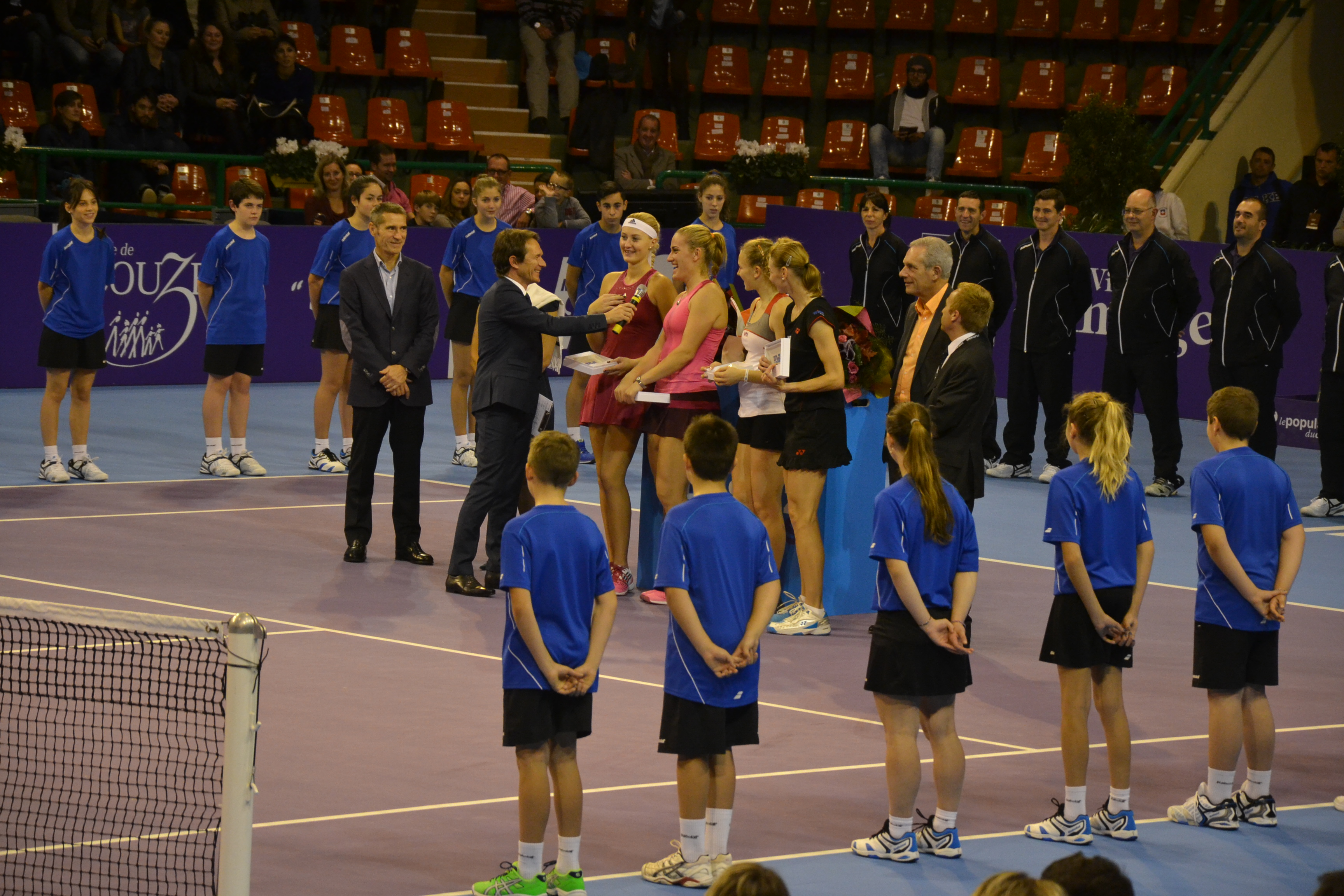 Remise des prix du tableau de doubles de l'open de tennis de Limoges 2014.